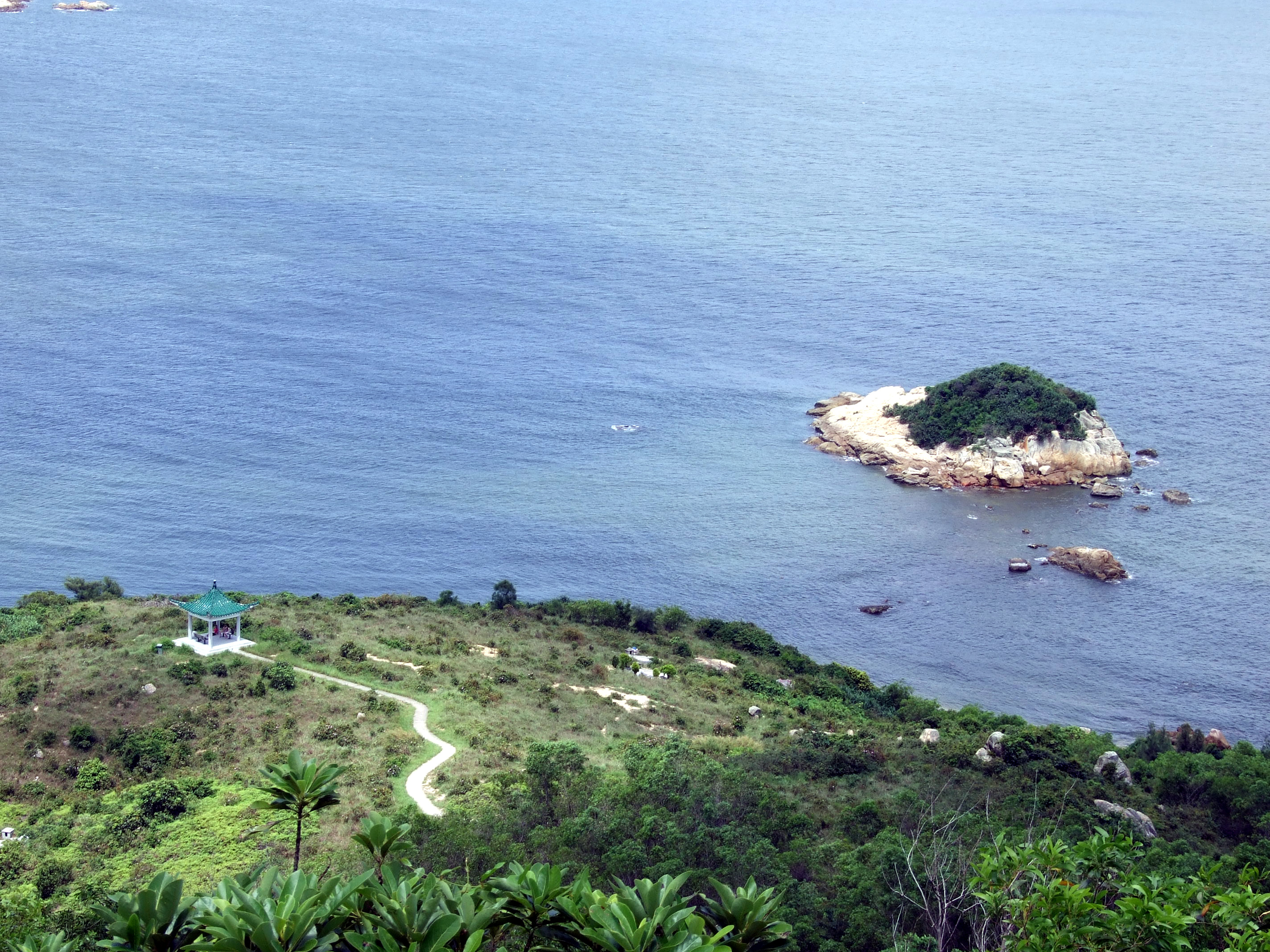 中文（香港）: 坪洲天涯海角及銀洲